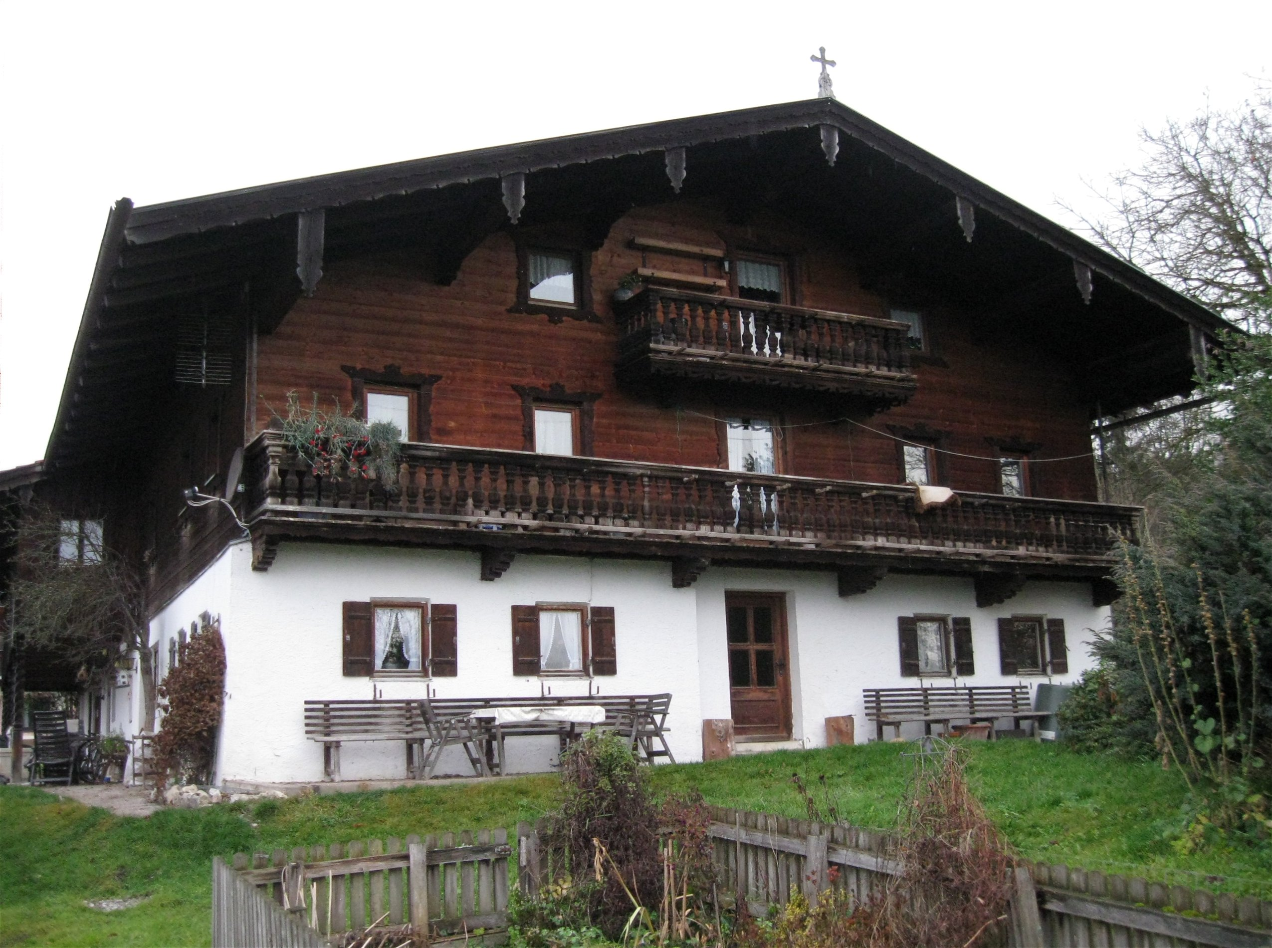 Eck 6; "Boider"; Bauernhaus mit nachträglich verschaltem und z. T. Blockbau-Obergeschoss, an der Firstpfette bez. 1743; Hocheck, Oberaudorf